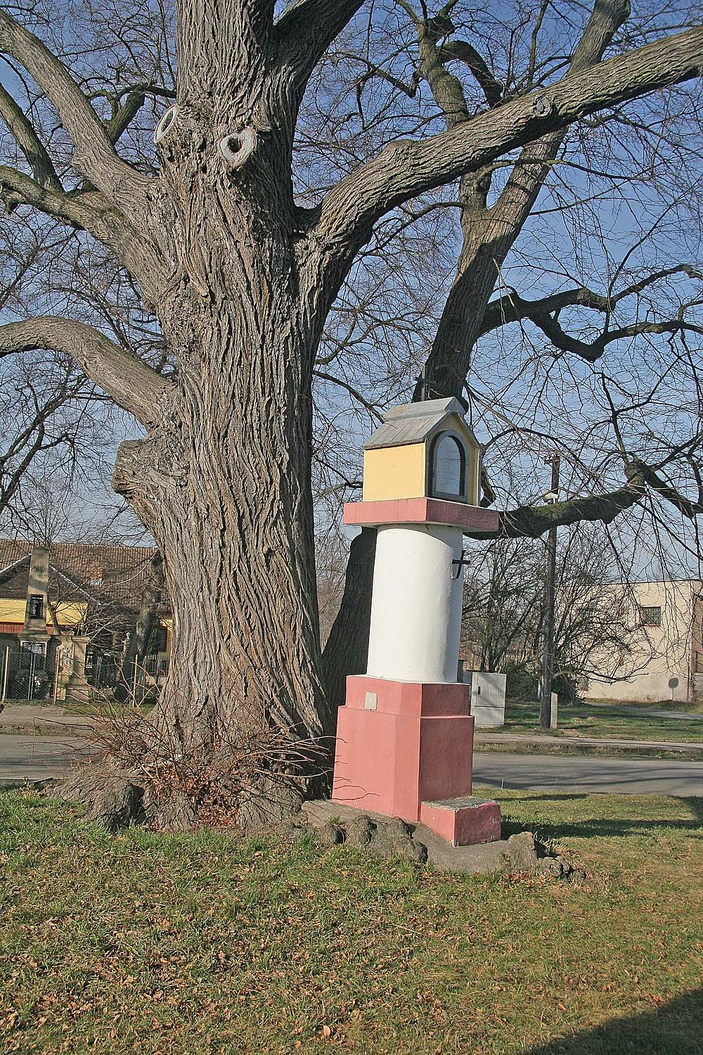 Veltruby - Boží muka pod památnou lípou, district Kolín autor: Prazak date: 5. 2. 2007